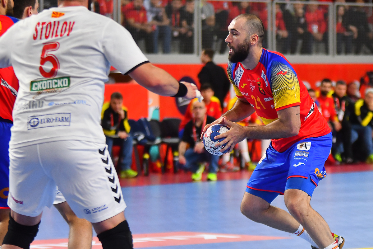 EHF EURO 2018 Makedonija-Spanija, 21.01.2018